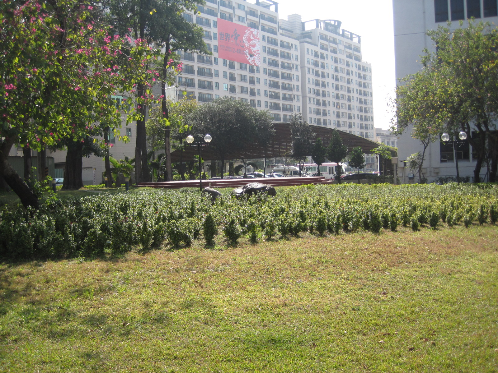 好望角計畫東10（臺南市衛生局）